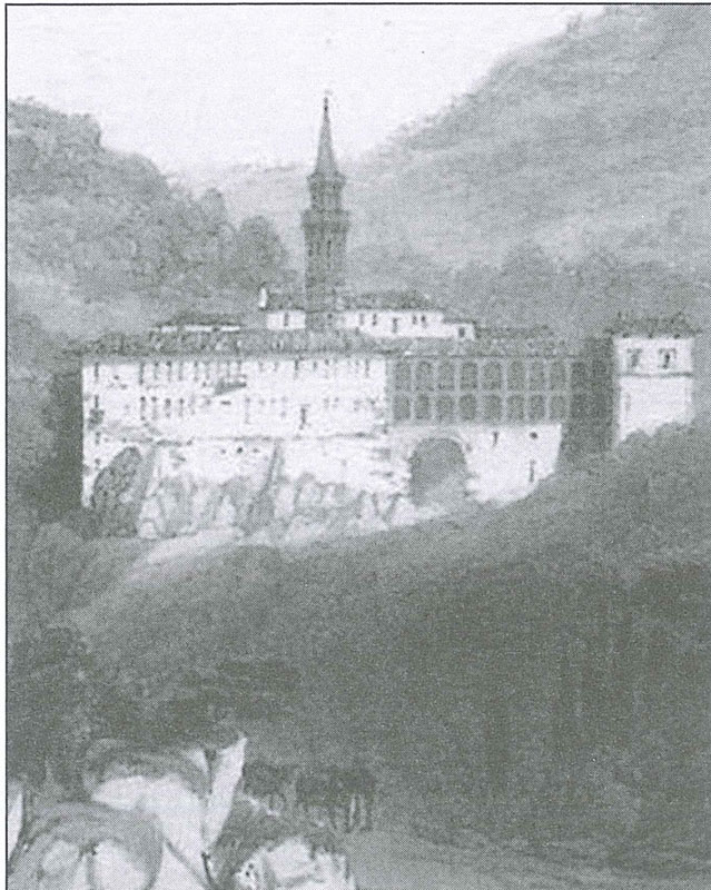 Dibuix del monestir de Sant Jeroni de la Vall d'Hebron per Pau Rigalt i Fargas